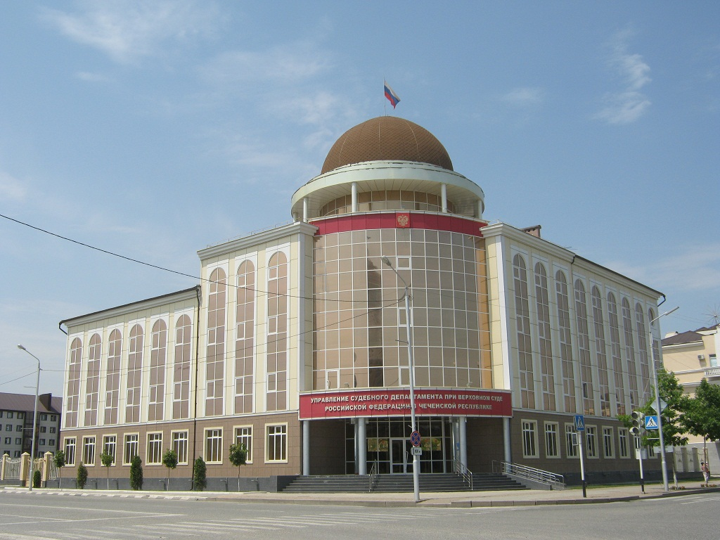 Грозный